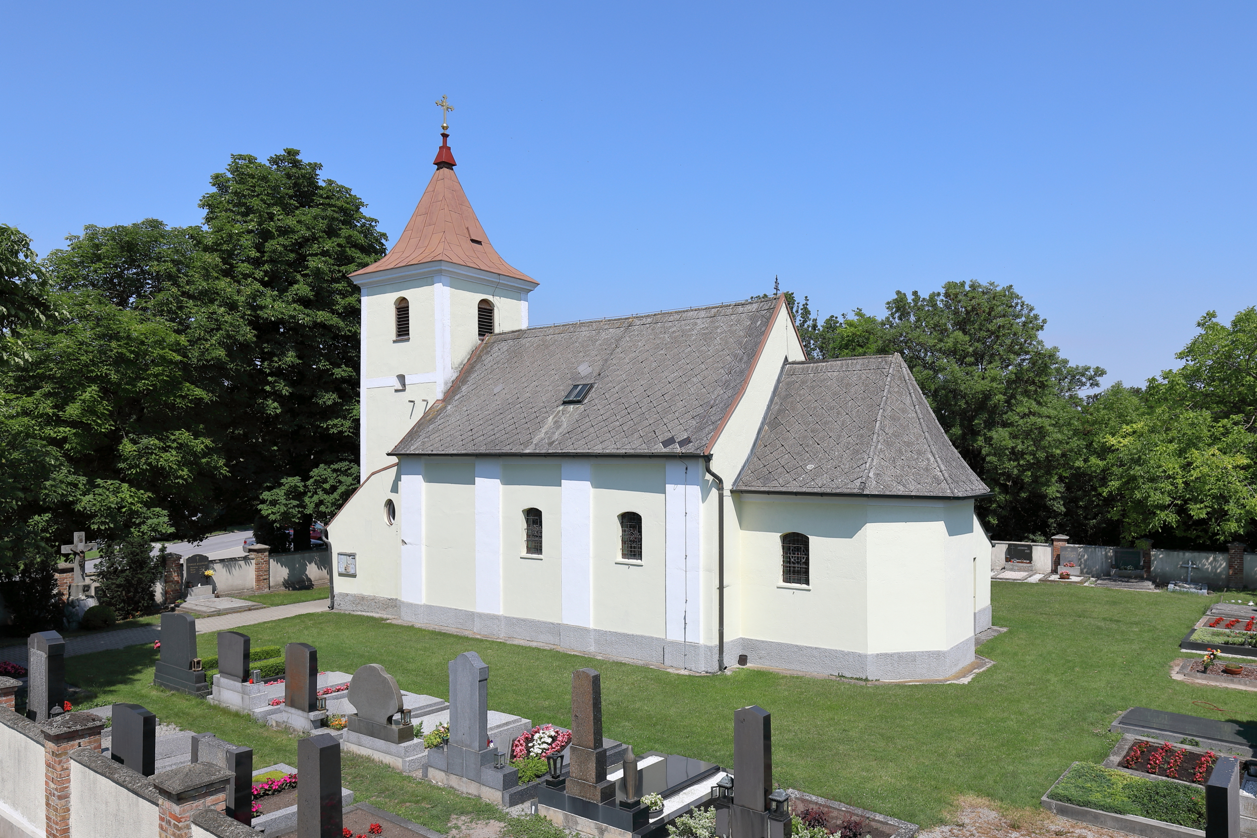 Südostansicht der röm.-kath. Filialkirche hl. Dreifaltigkeit in Wagram an der Donau, ein Dorf in der niederösterreichischen Marktgemeinde Eckartsau. Die kleine spätbarocke Dorfkirche mit einem gedrungenen vorgesetzten Westturm wurde in der 2. Hälfte des 18. Jahrhunderts errichtet.